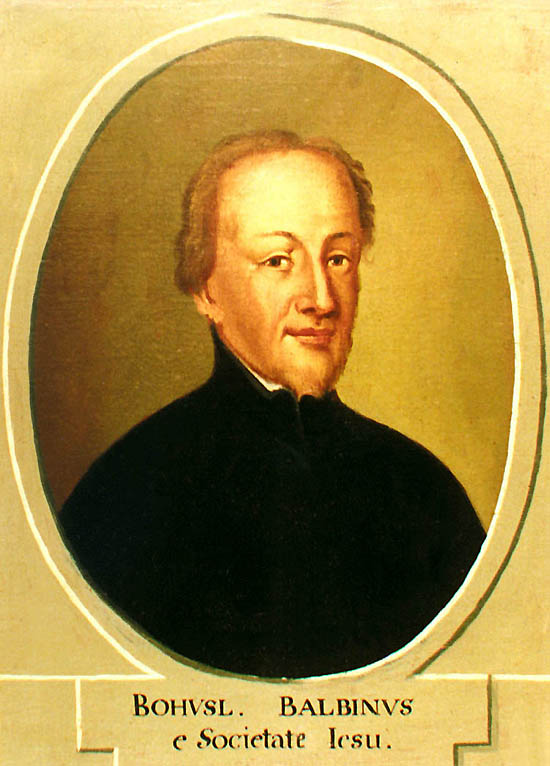 Zlatokorunská škola, učební pomůcka z 18. století, portrét Bohuslava Balbína